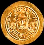 Pièce du règne de Khosro II